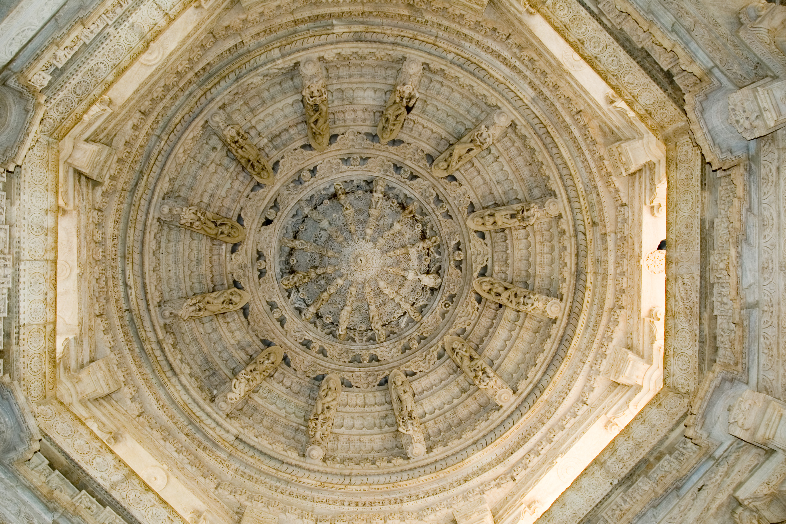 Ranakpur